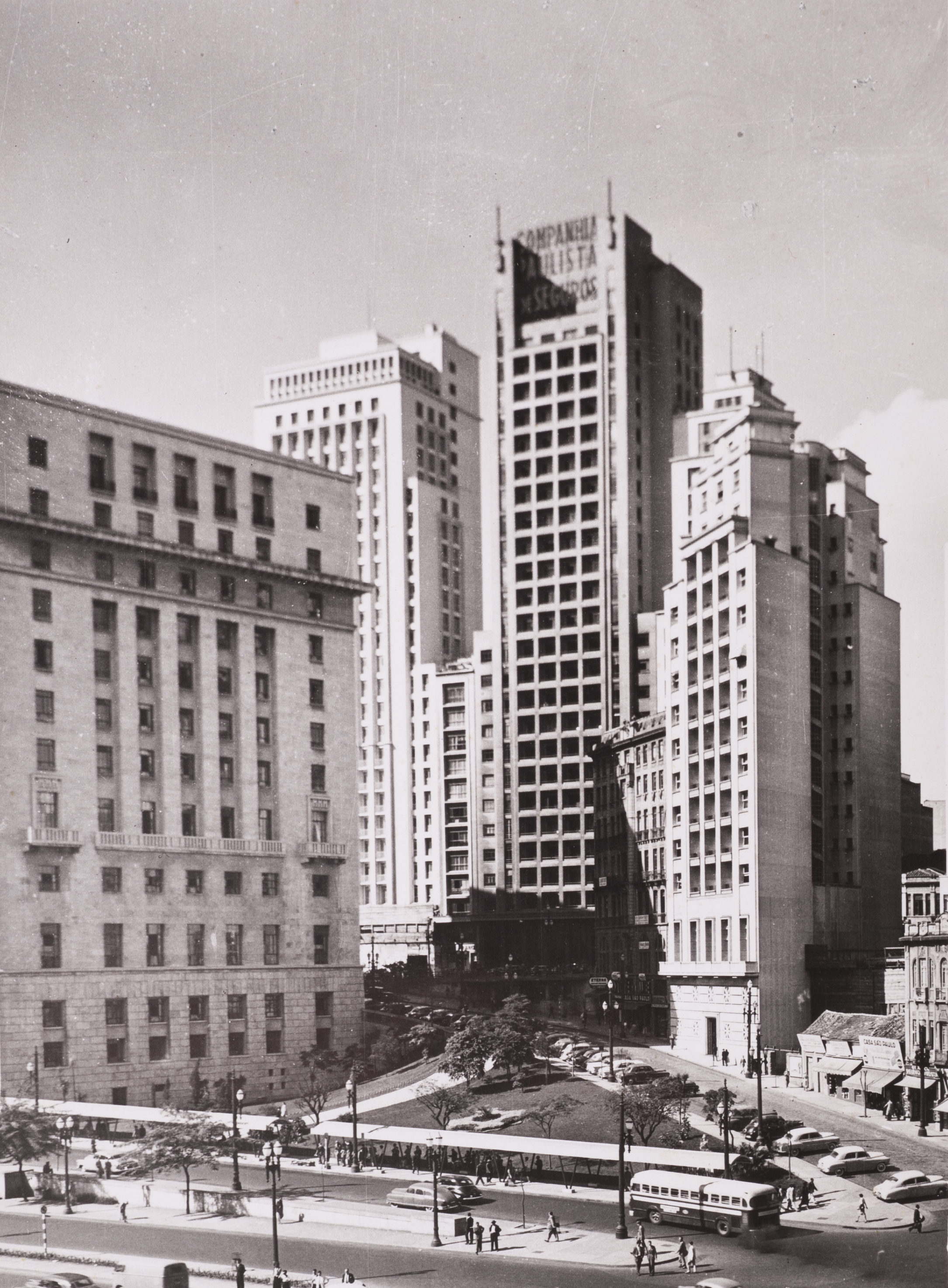 Obra que integra o acervo do Museu Paulista da USP. Coleção Werner Haberkorn - CHW